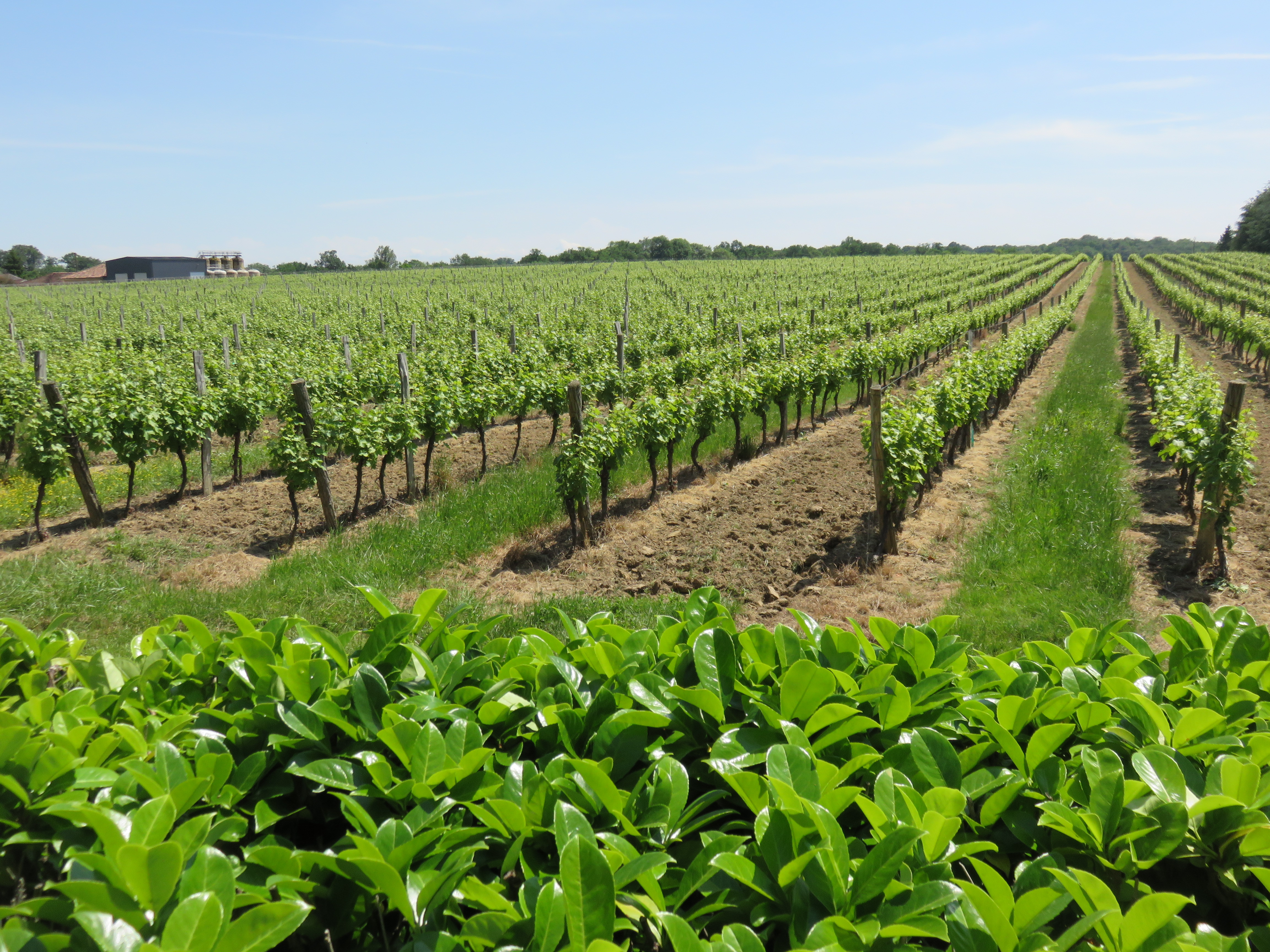 Vue sur une parcelle de vignes, à Réans (Gers, France).